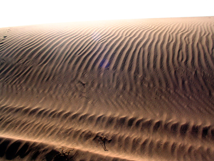 Sossusvlei Dune, Namibia